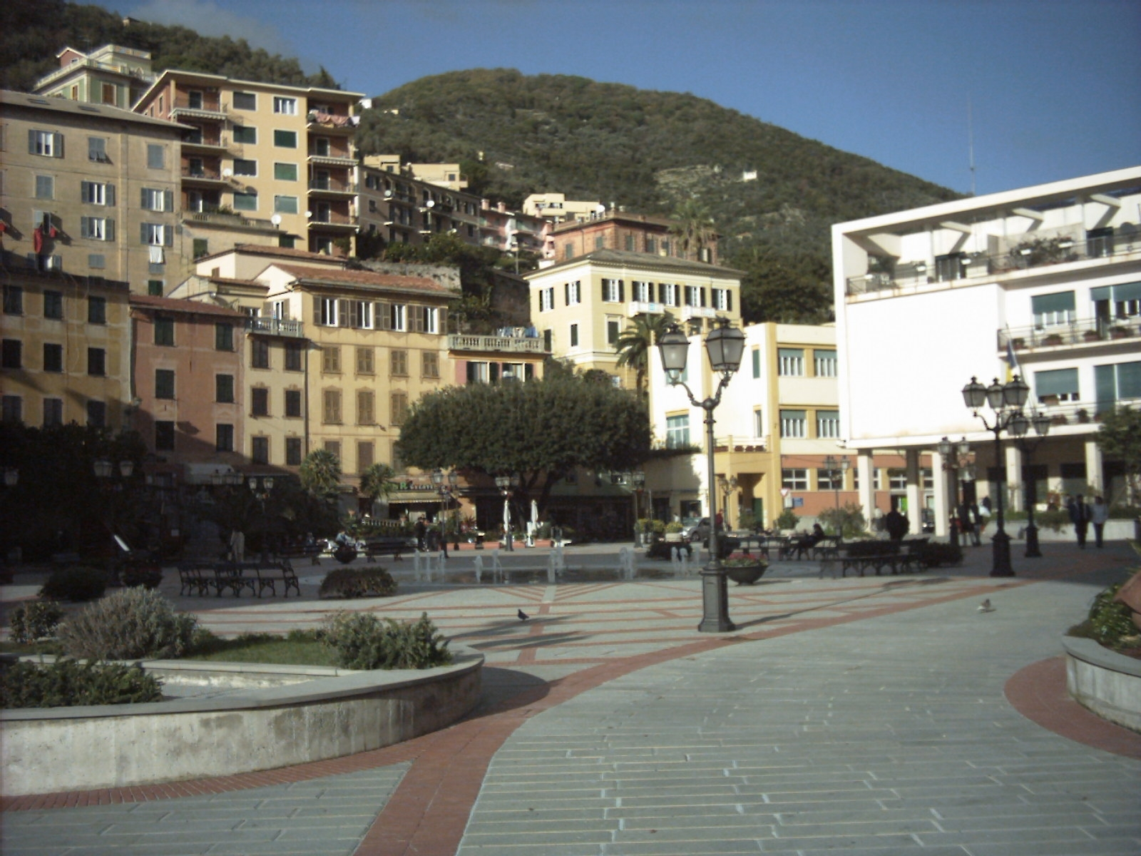 Piazza XXVII Dicembre